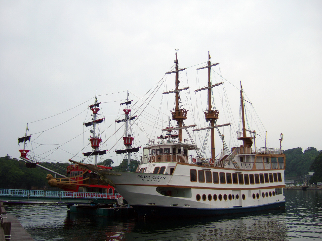 九十九島遊覧船「パールクィーン」（西海パールシーリゾート桟橋にて）